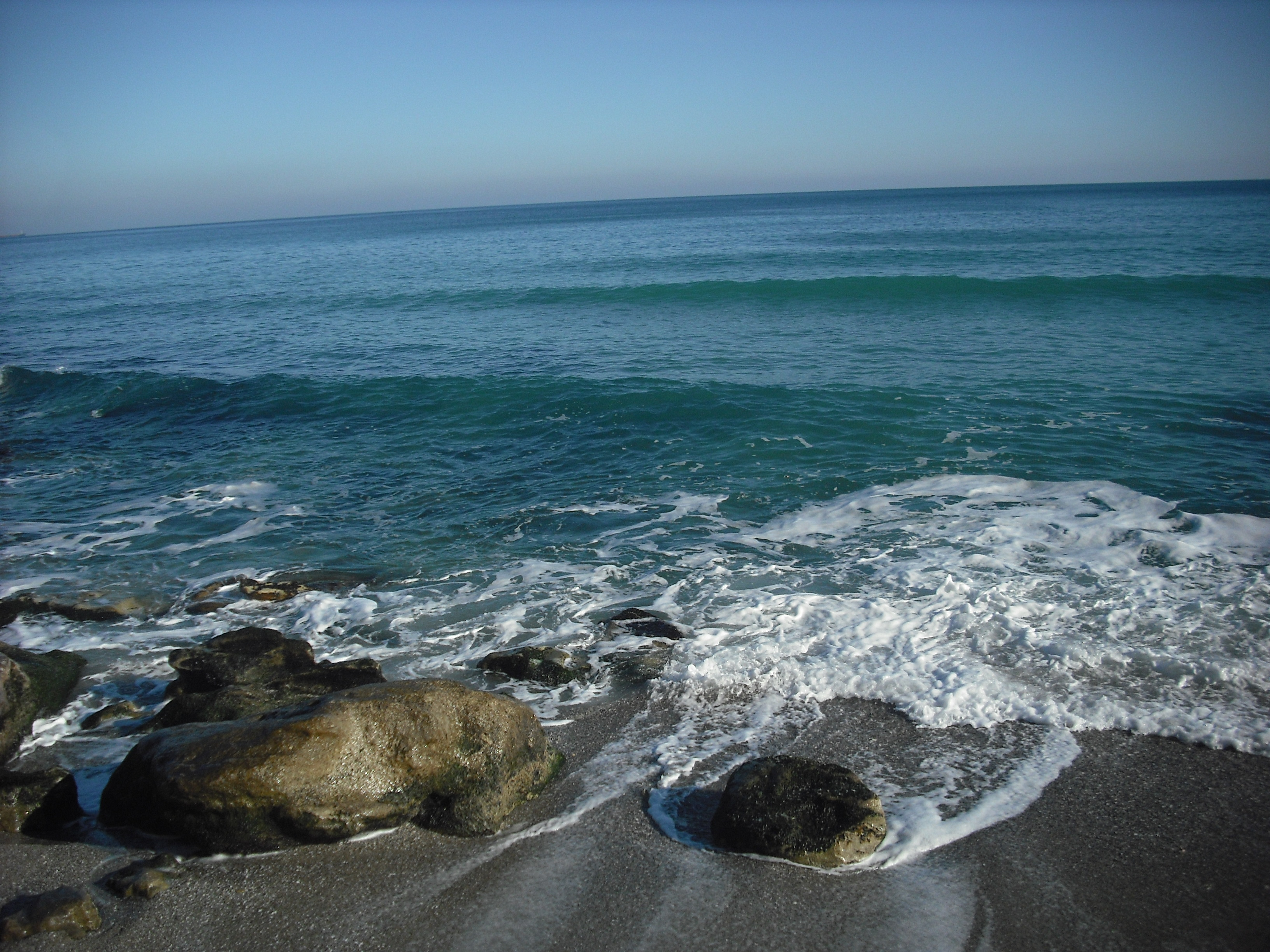 Плажът на Черноморец.